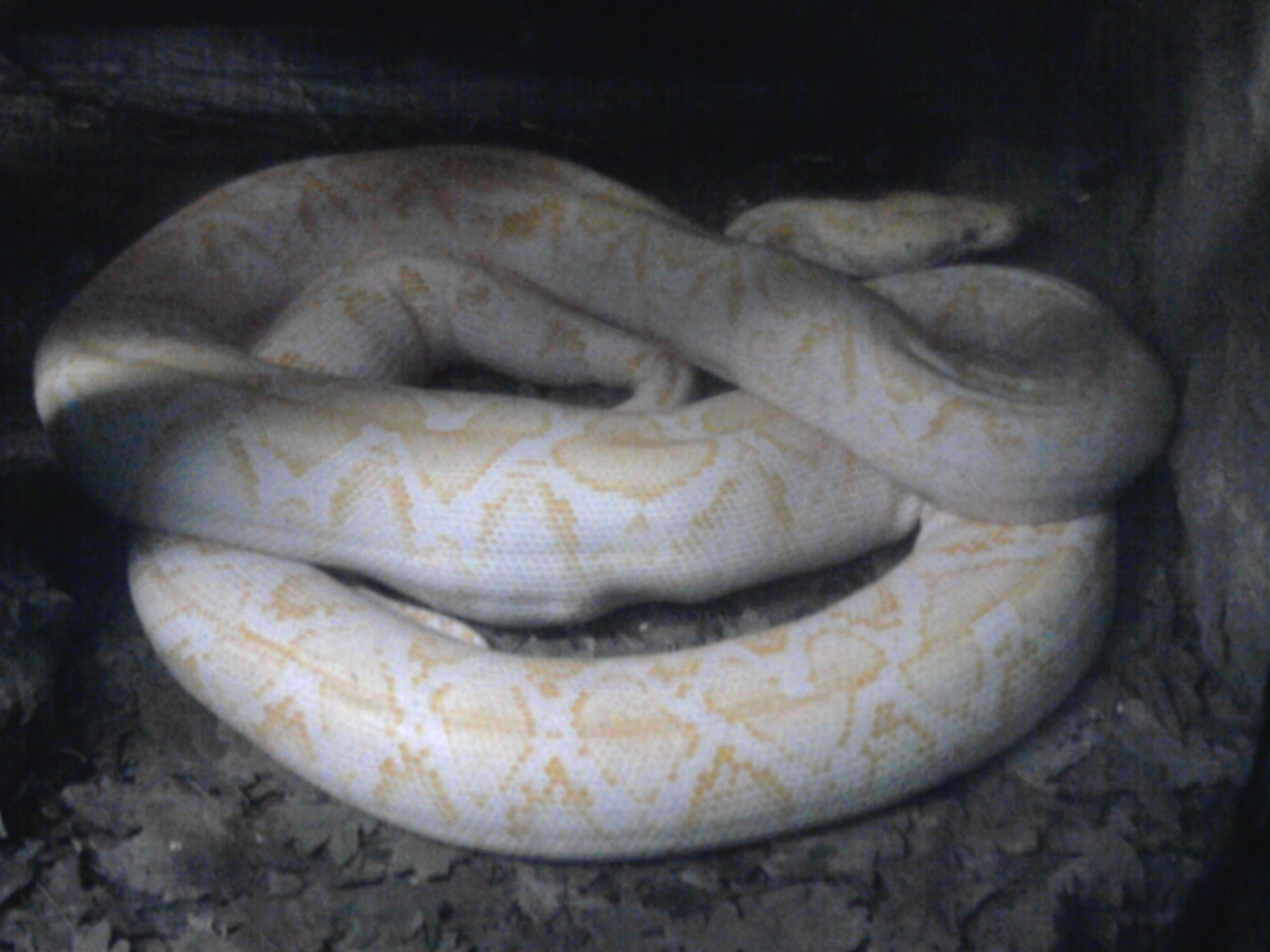 Ejemplar de pitón reticulada albina, que habita en el "Herpetario" del Buin Zoo, Chile.